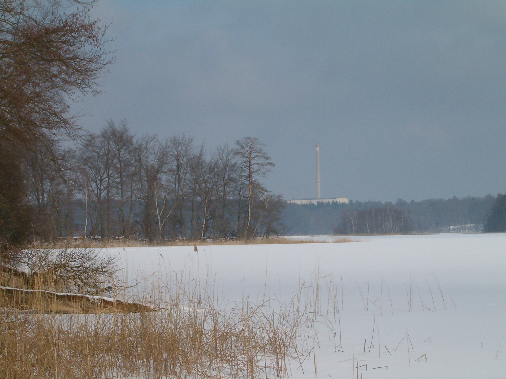 Nehmitzsee Rheinsberger Seengebiet Brandenburg Zugefroren und verschneit im Hintergrund das stillgelegte Kernkraftwerk Rheinsberg (KKR) March, 08, 2006 Picture taken by me: User:BotBln